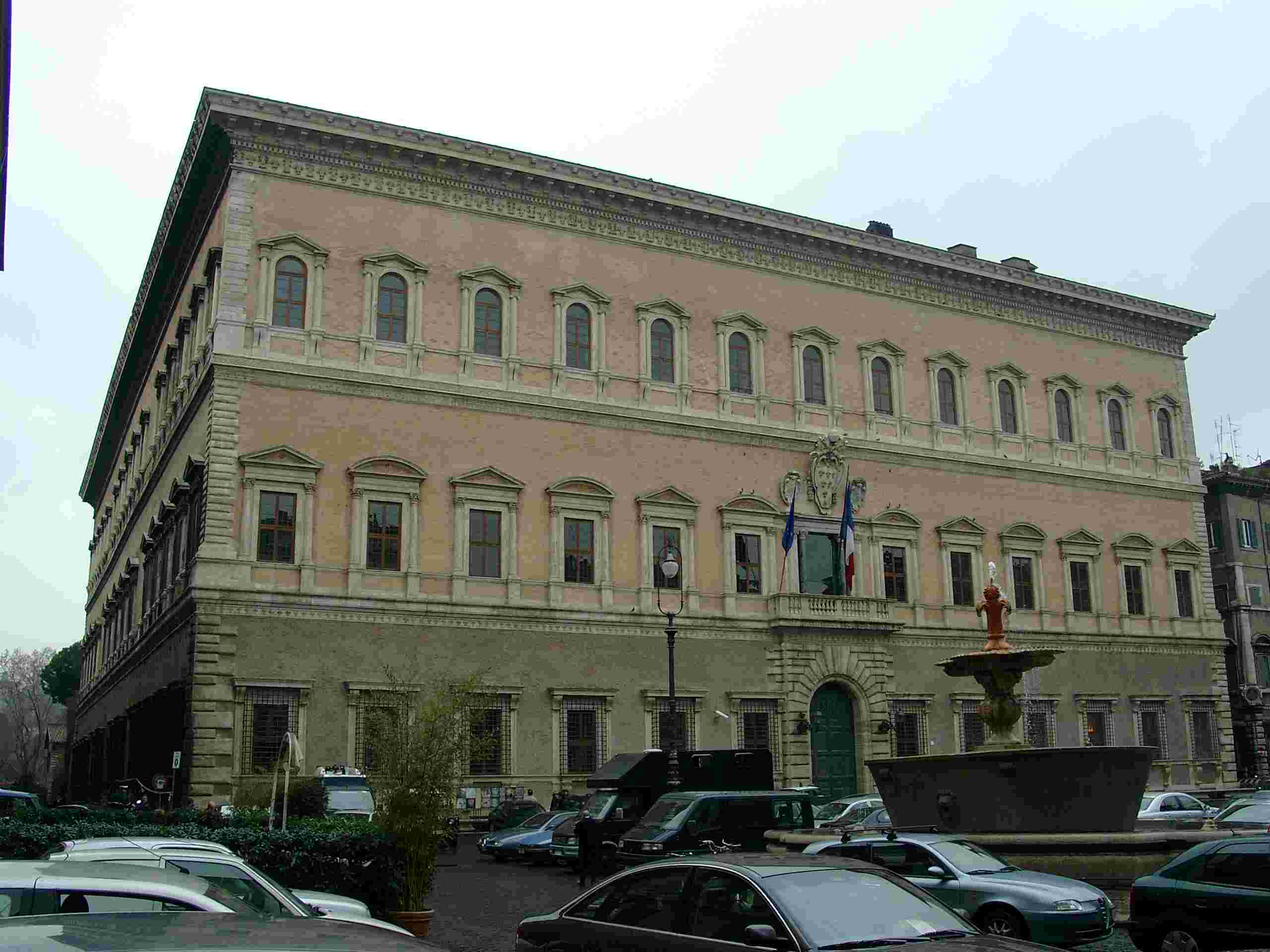 Palazzo Farnese a Roma, oggi sede dell'ambasciata di Francia. original text: Privatfoto vom 26.2.2004, Br 11:17, 22. Jan 2005 (CET)